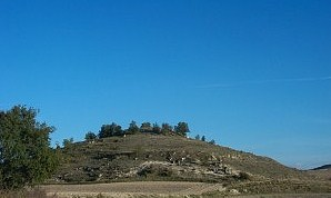 Zona llamada "El Castillo".